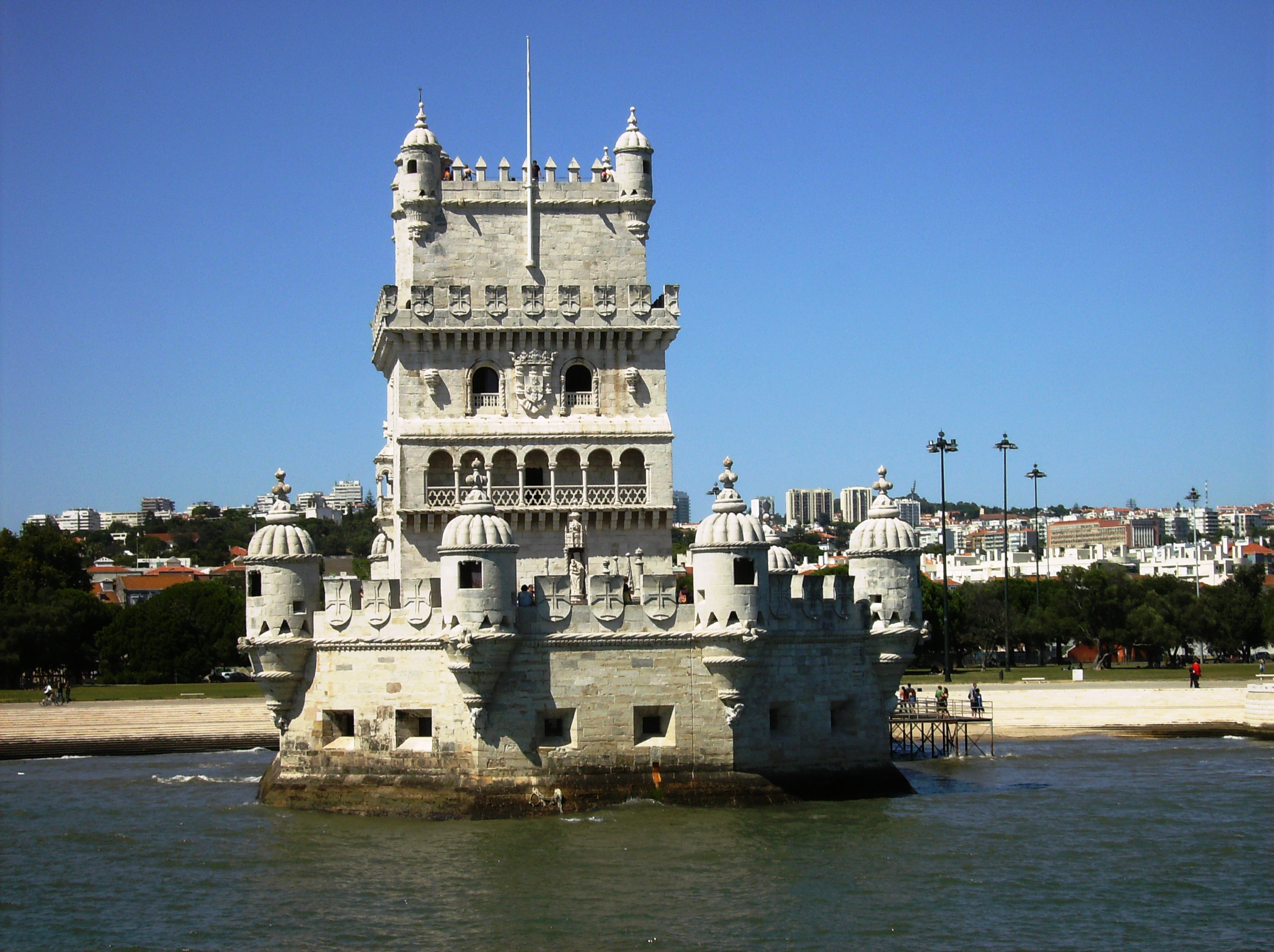 Torre de Belém, Santa Maria de Belém, Lisboa, Portugal: vista a partir do rio Tejo.